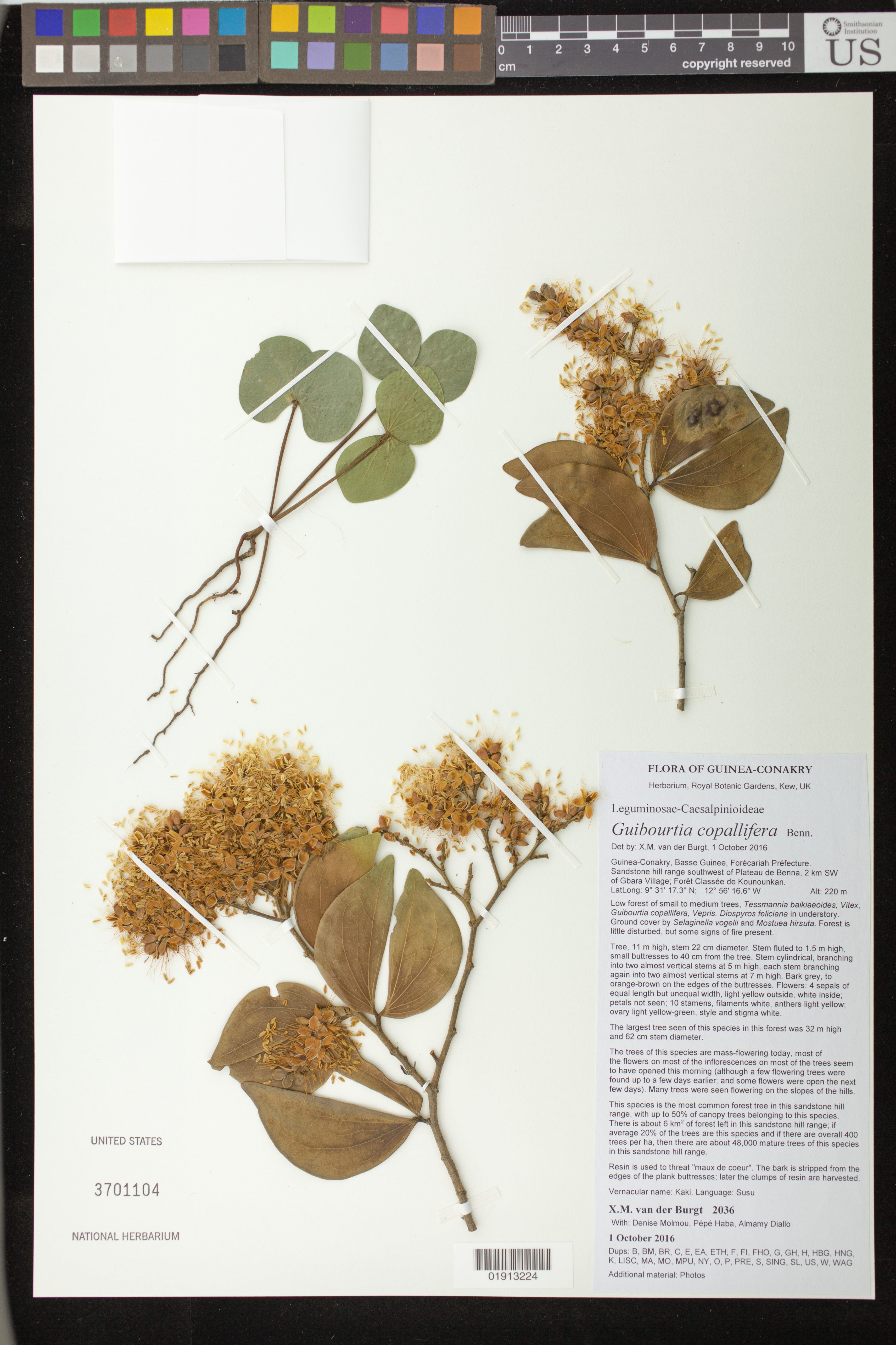 Guibourtia copallifera Object Details Biogeographical Region 22 - West Tropical Africa Collector Xander M. van der Burgt D. Molmou Pepe Haba A Diallo Microhabitat Description Sandstone hill. Min. Elevation 220 Record Last Modified 25 Sep 2017 Specimen Count 1 Collection Date 1 Oct 2016 Barcode 01913224 USNM Number 3701104 Place Guinea-Conakry, Basse Guinee, Forecariah Prefecture. Sandstone hill range southwest of Plateau de Benna, 2 km SW of Gbara Village; Foret Classee de Kounounkan., Kindia, Guinea, Africa Published Name Guibourtia copallifera Taxonomy Plantae Dicotyledonae Rosales Fabaceae Caesalpinioideae NMNH - Botany Dept. Record ID nmnhbotany_13483119 Usage of Metadata (Object Detail Text) CC0 GUID (Link to Original Record)